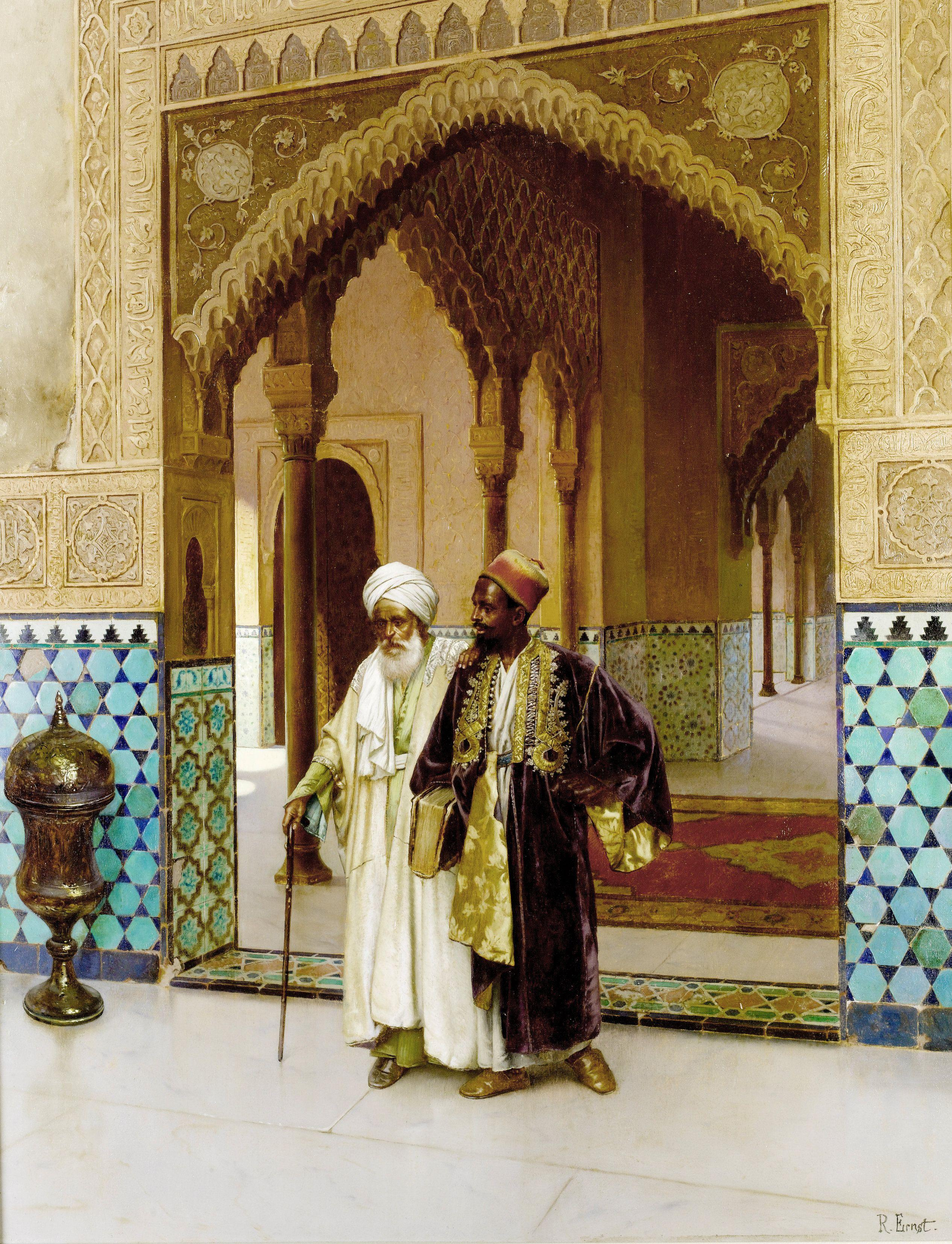 After Prayers